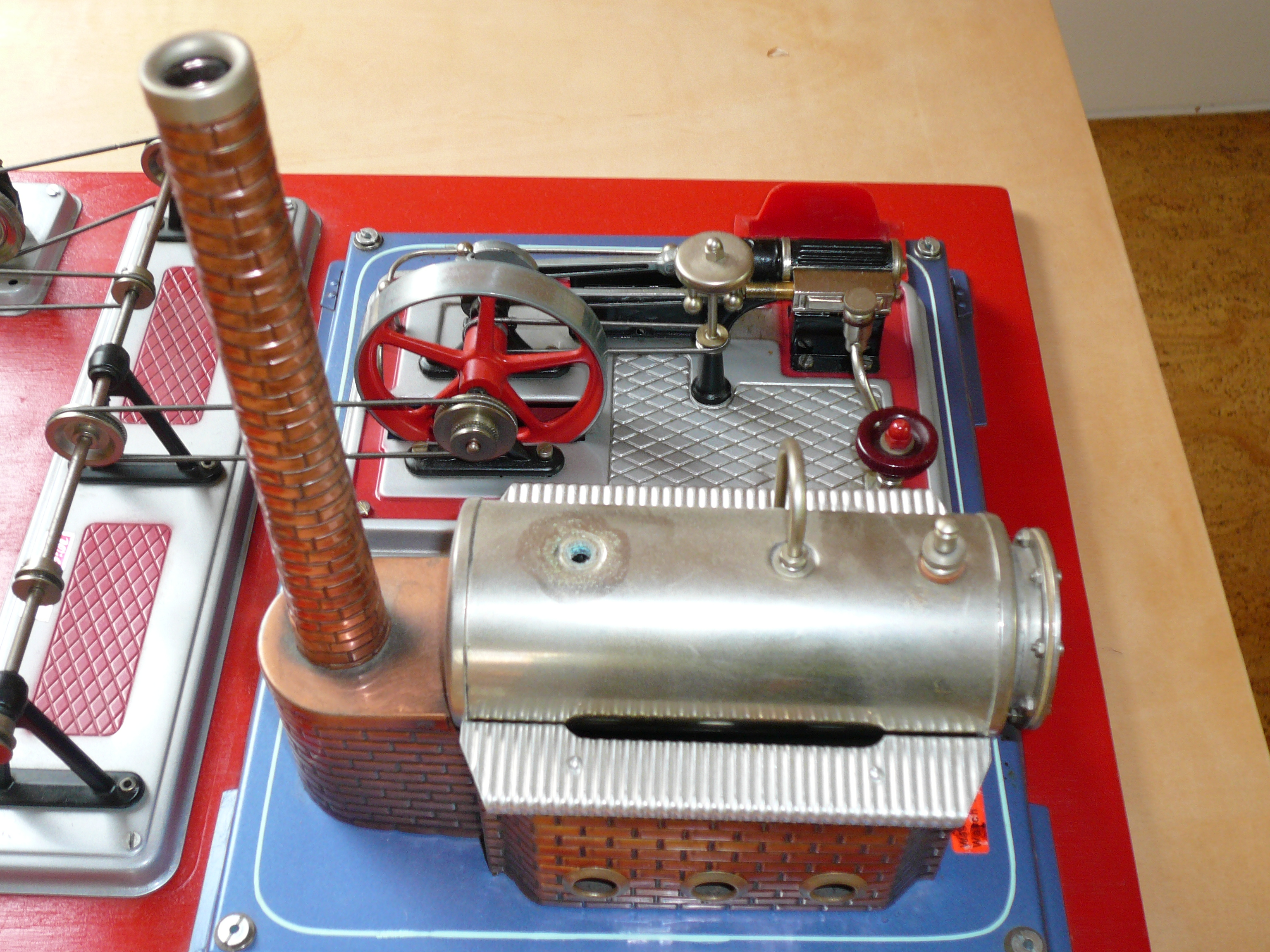 Eine Stationäre Modelldampfmaschine